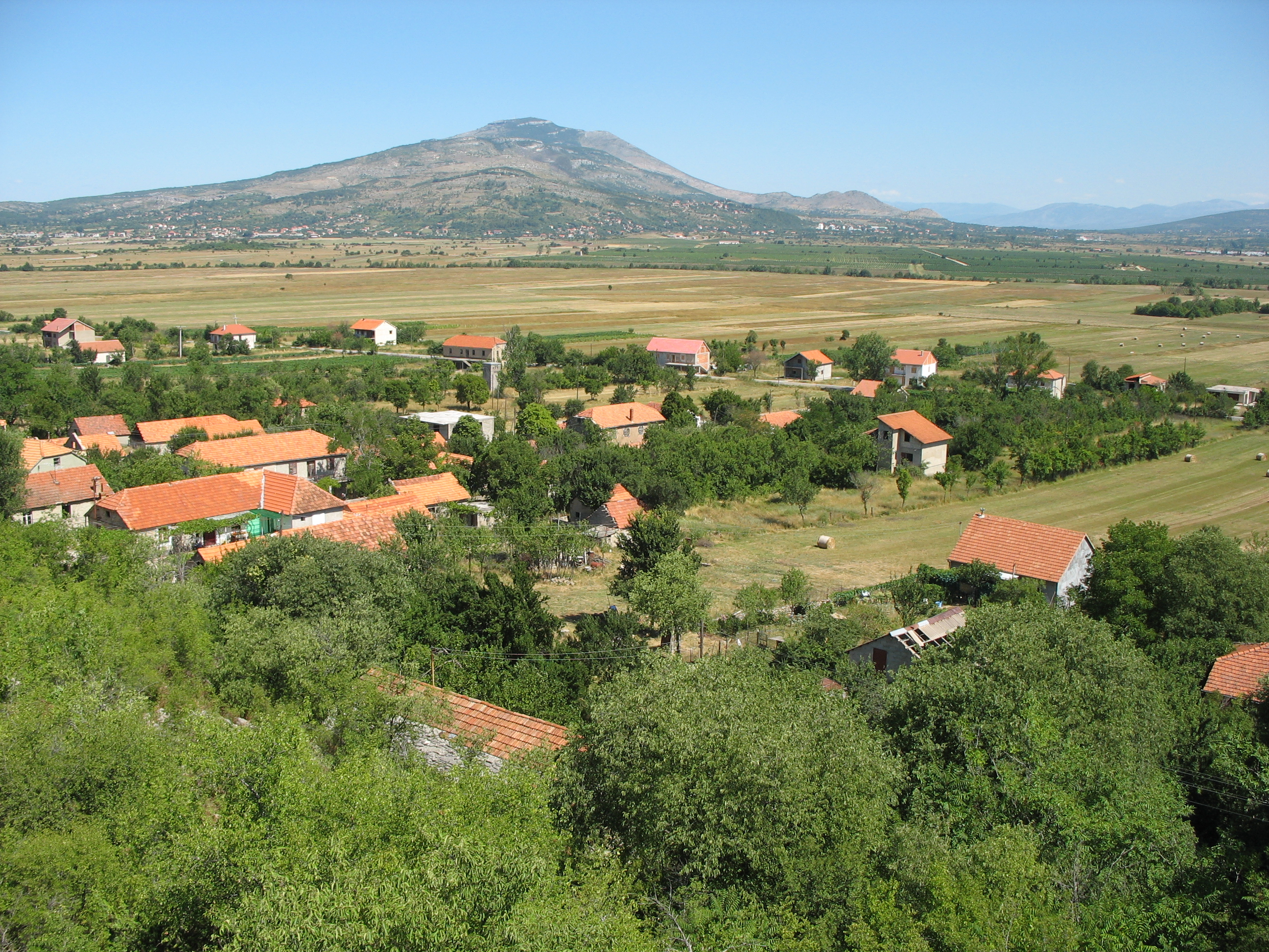 Kričke kod Drniša.